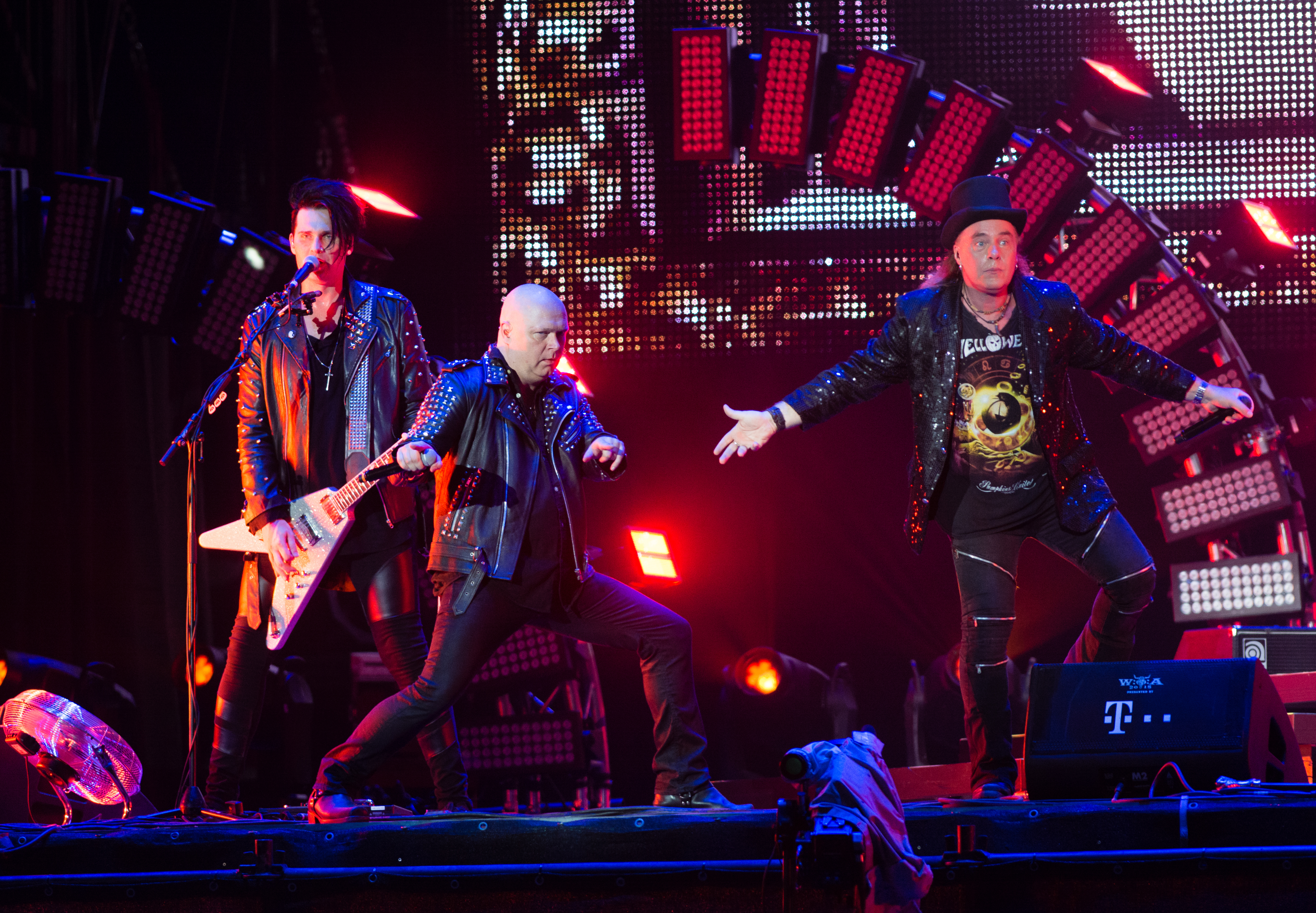 Helloween - Pumpkins United beim Wacken Open Air 2018